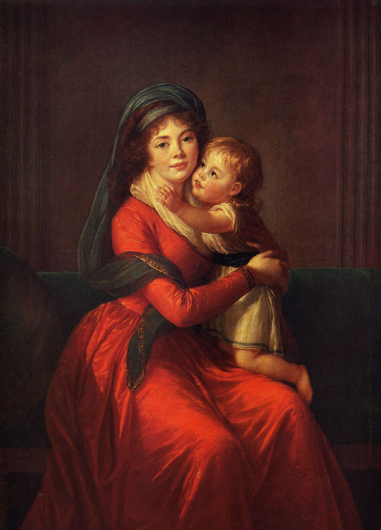 Александра Петровна Голицына, урожденная Протасова (20.03.1774-16(28).10.1842 Париж) – жена шталмейстера князя Алексея Андреевича Голицына. Ее сын – Петр Алексеевич Голицын (1792-1842). Портрет выполнен в Вене, где Виже-Лебрен жила с 1792 по 1795 год.